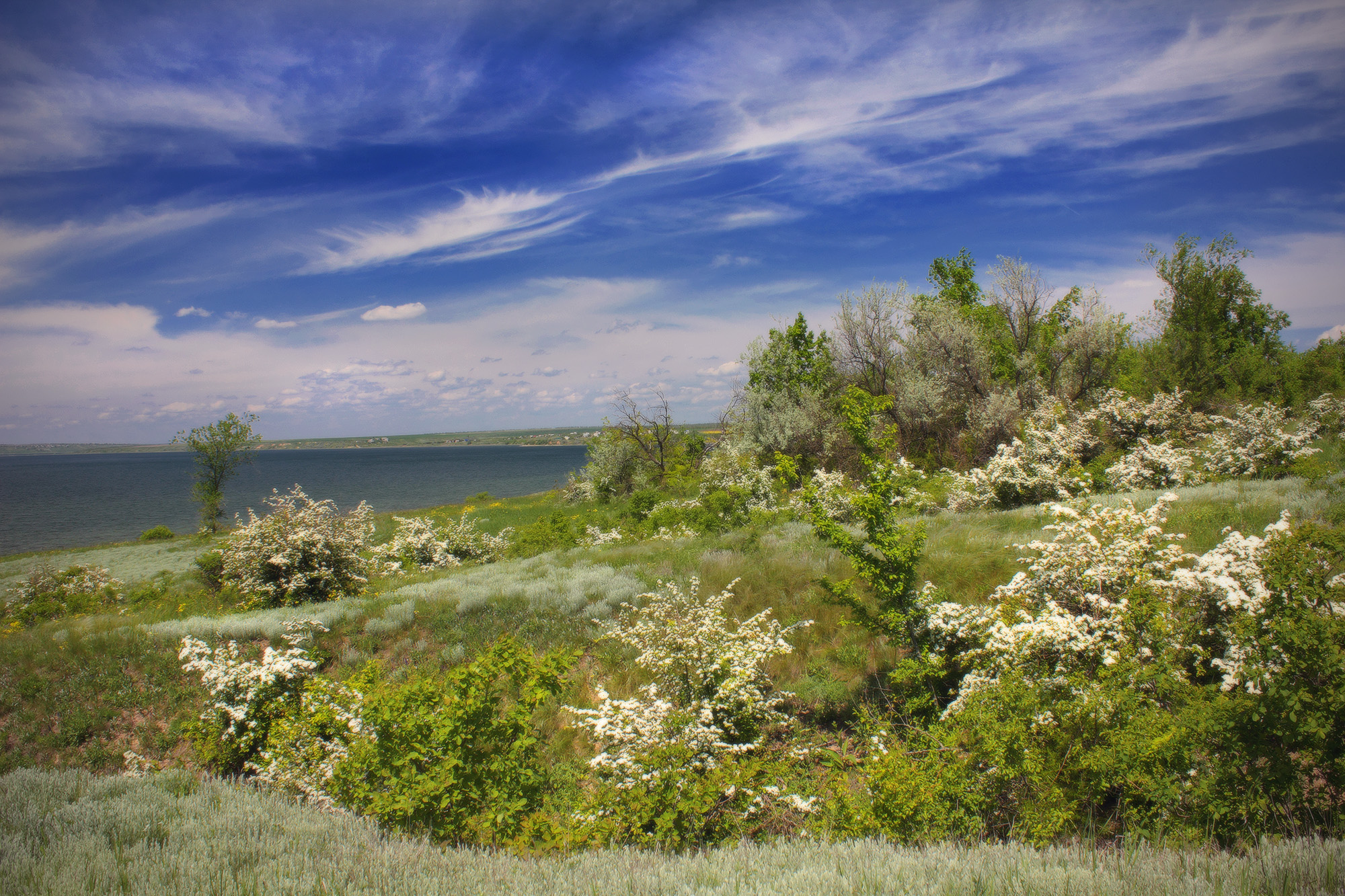 «Тилігульський», Березанський район